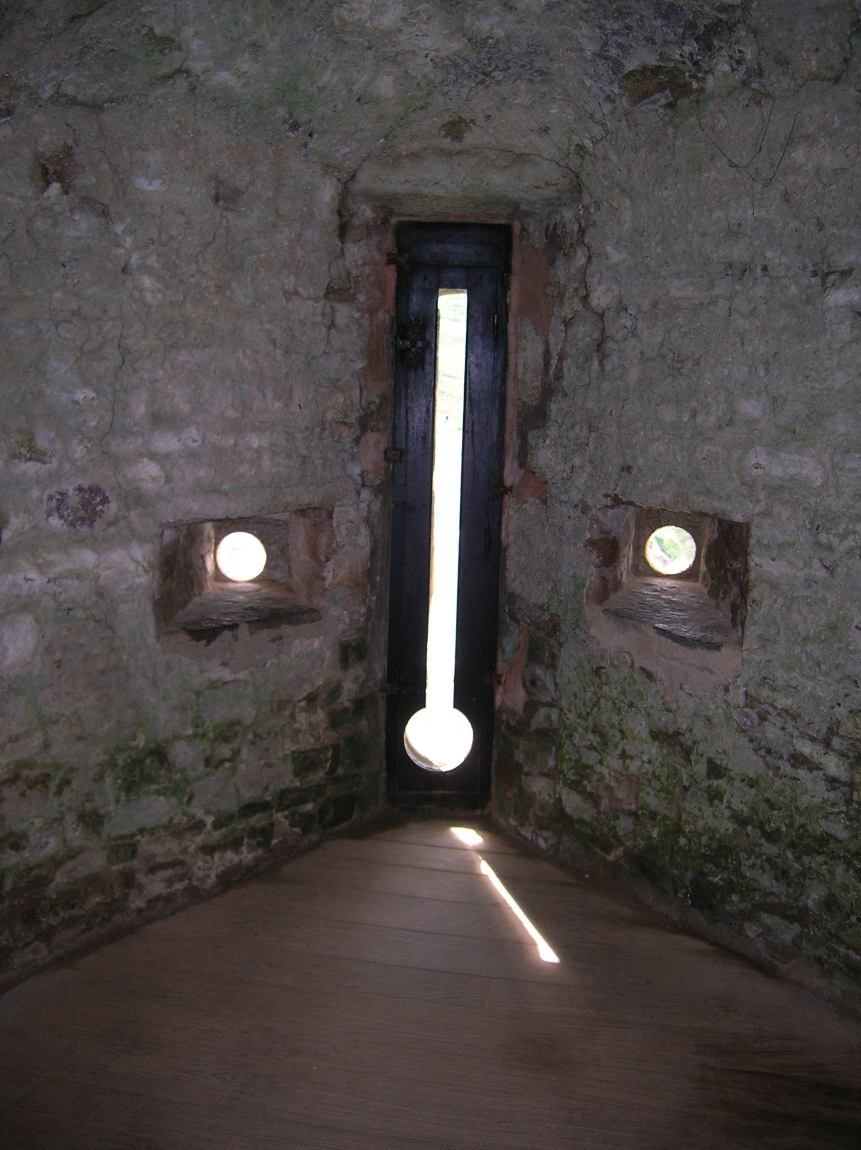 Fort La Latte, Côtes d'Armor, France